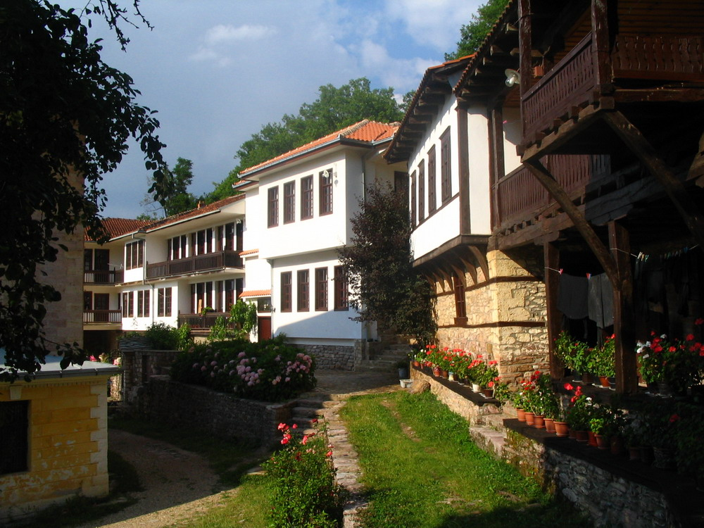 Св. Богородица Пречиста Кичевска, Автор: Љупчо Зорески